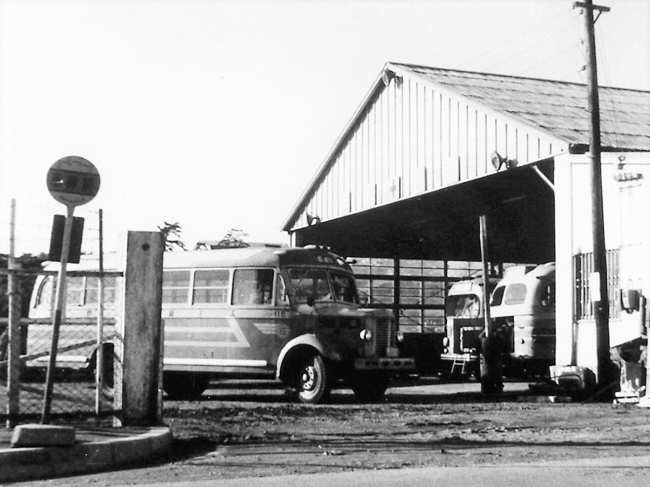 いすゞBX91型バス 1950年式 帝國車体 江ノ島鎌倉観光